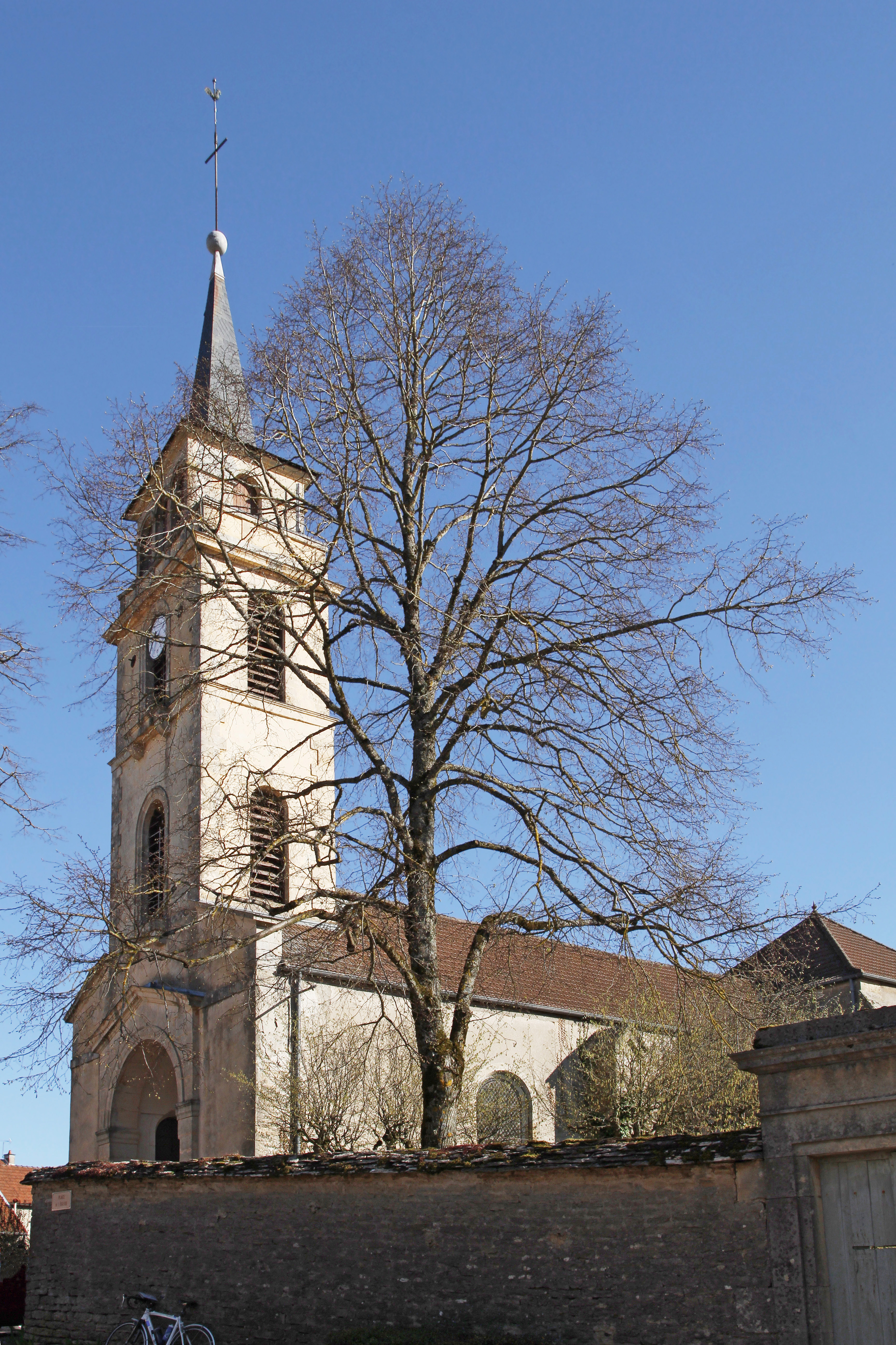 Église Saint-Maurice de Francheville